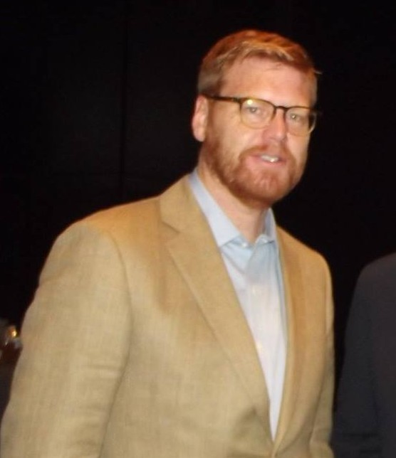 John Kahrs au festival international du film d'animation d'Annecy 2018.